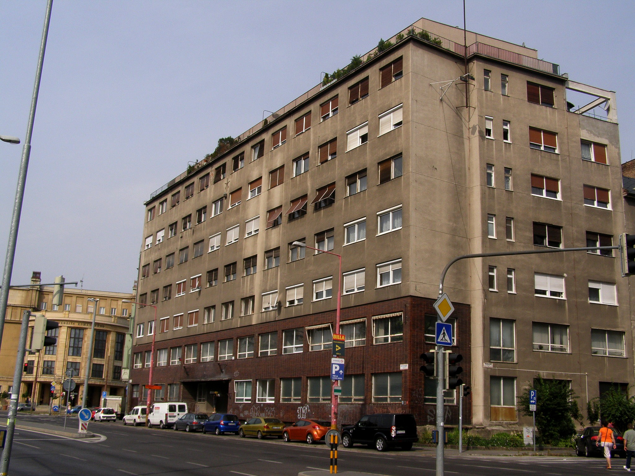 Dostojevského rad č. 1. Celkový pohľad na budovu Object location48° 08′ 29.04″ N, 17° 07′ 01.92″ E